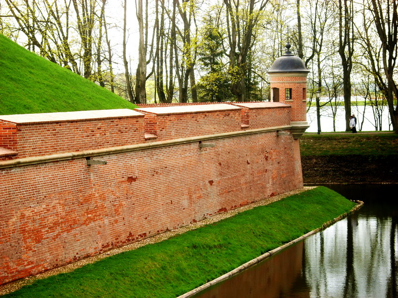 Нясвіж і Нясвіжскі замак